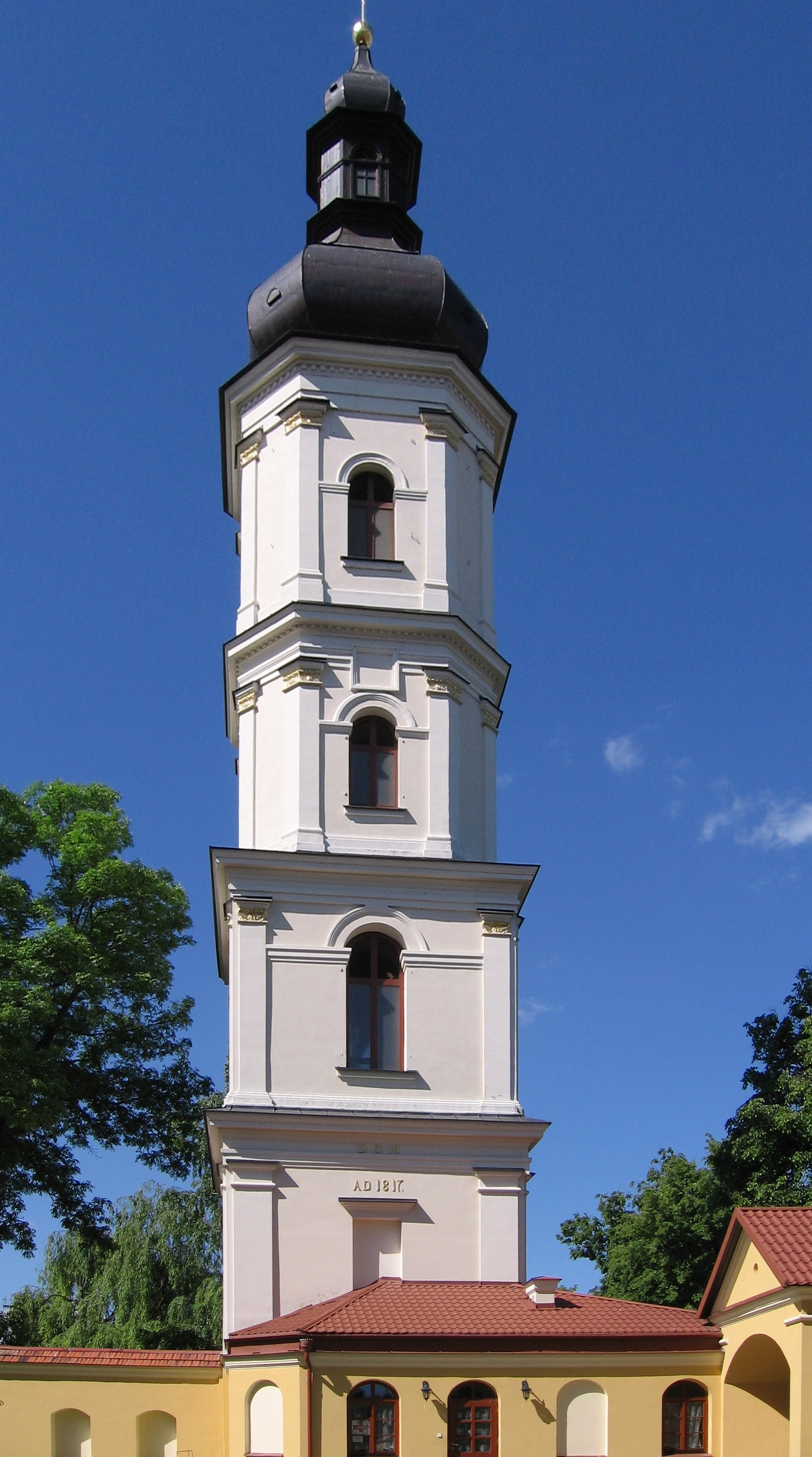 Беларуская (тарашкевіца): Ансамбль былога кляштара францысканцаў у межах агароджыдэкаратыўнае ўбраньне касьцёла:6 алтароў са скульптурай амбонроспісы скляпеньняў2 фрэскі ў бакавых алтарах. г. Пінск This is a photo of Belarusian heritage monument. Reference number: 111Г000538 ( WLM)